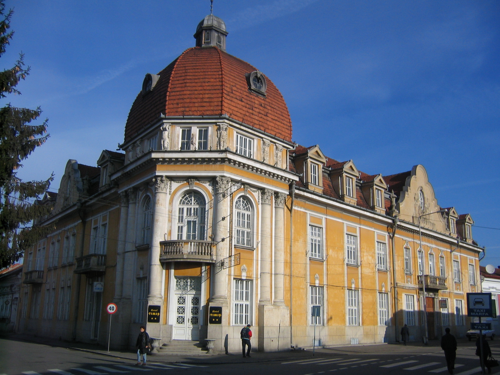 Hotel Timis, Lugoj, Romania